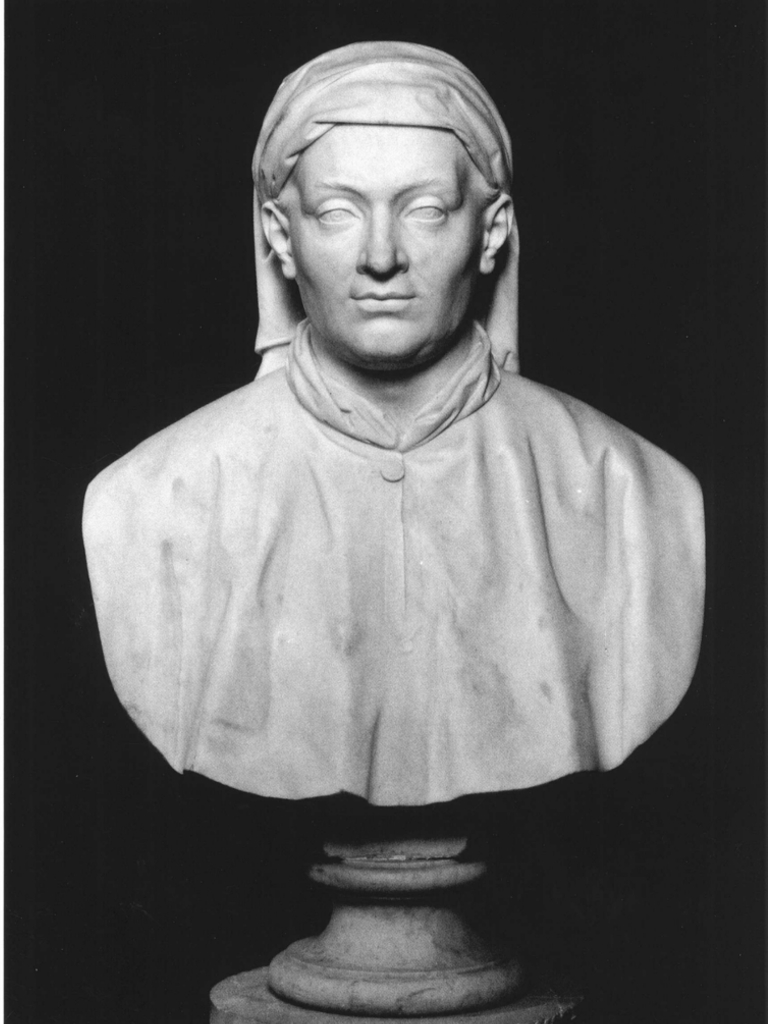 Busto di Gasparino Barzizza, opera di Domenico Passerini (1859-1861). Il busto fa parte del Panteon Veneto, conservato presso Palazzo Loredan di Campo Santo Stefano a Venezia.